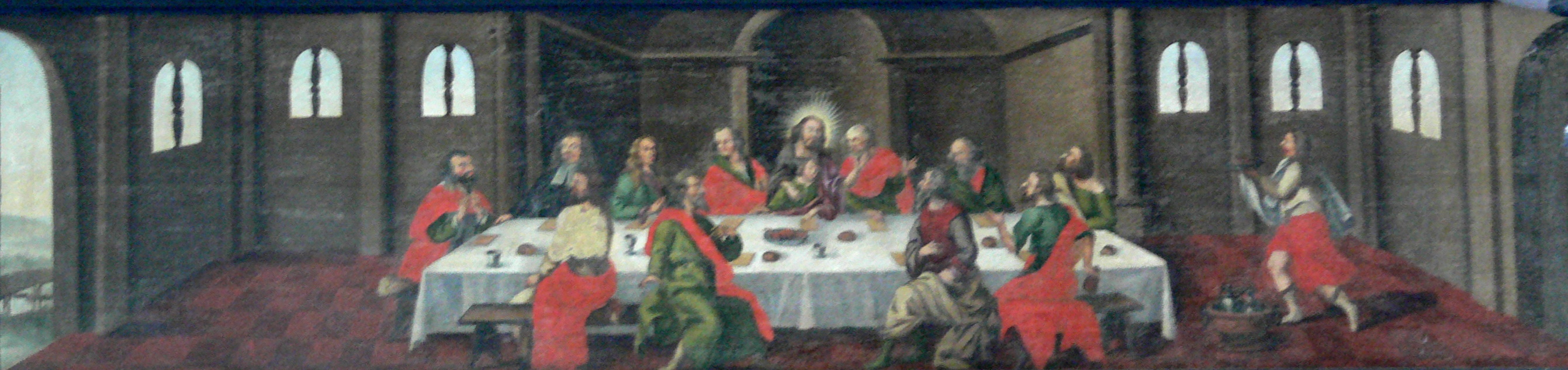 Luckau, Landkreis Dahme-Spreewald, Brandenburg St..-Nikolai-Kirche Hauptaltar von Abraham Jäger (Tischler) aus Doberlug und Christoph Krause (Maler) aus Großenhain, 1670: Predella "Letztes Abendmahl"